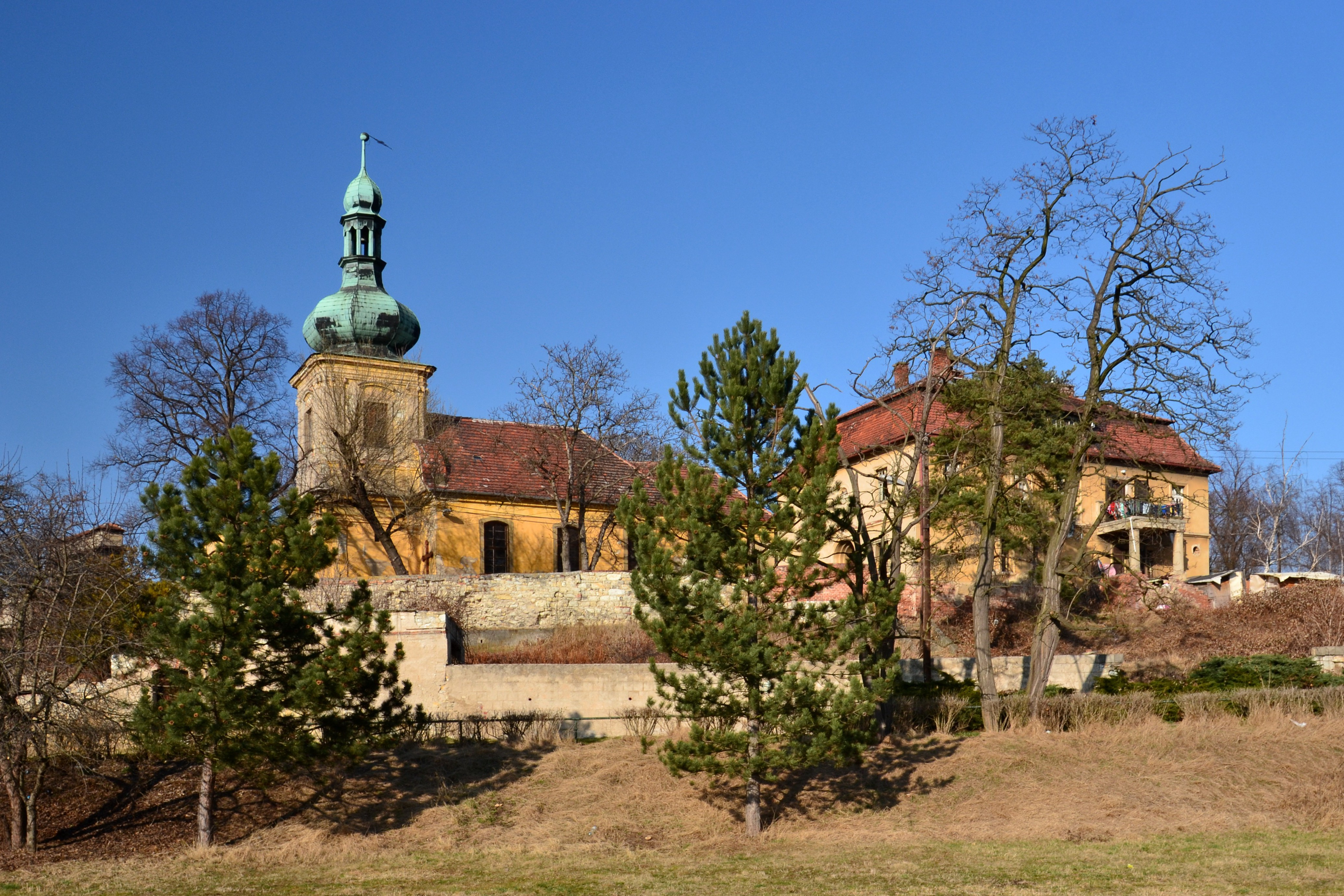 Kostel sv. Václava (Staňkovice), Staňkovice